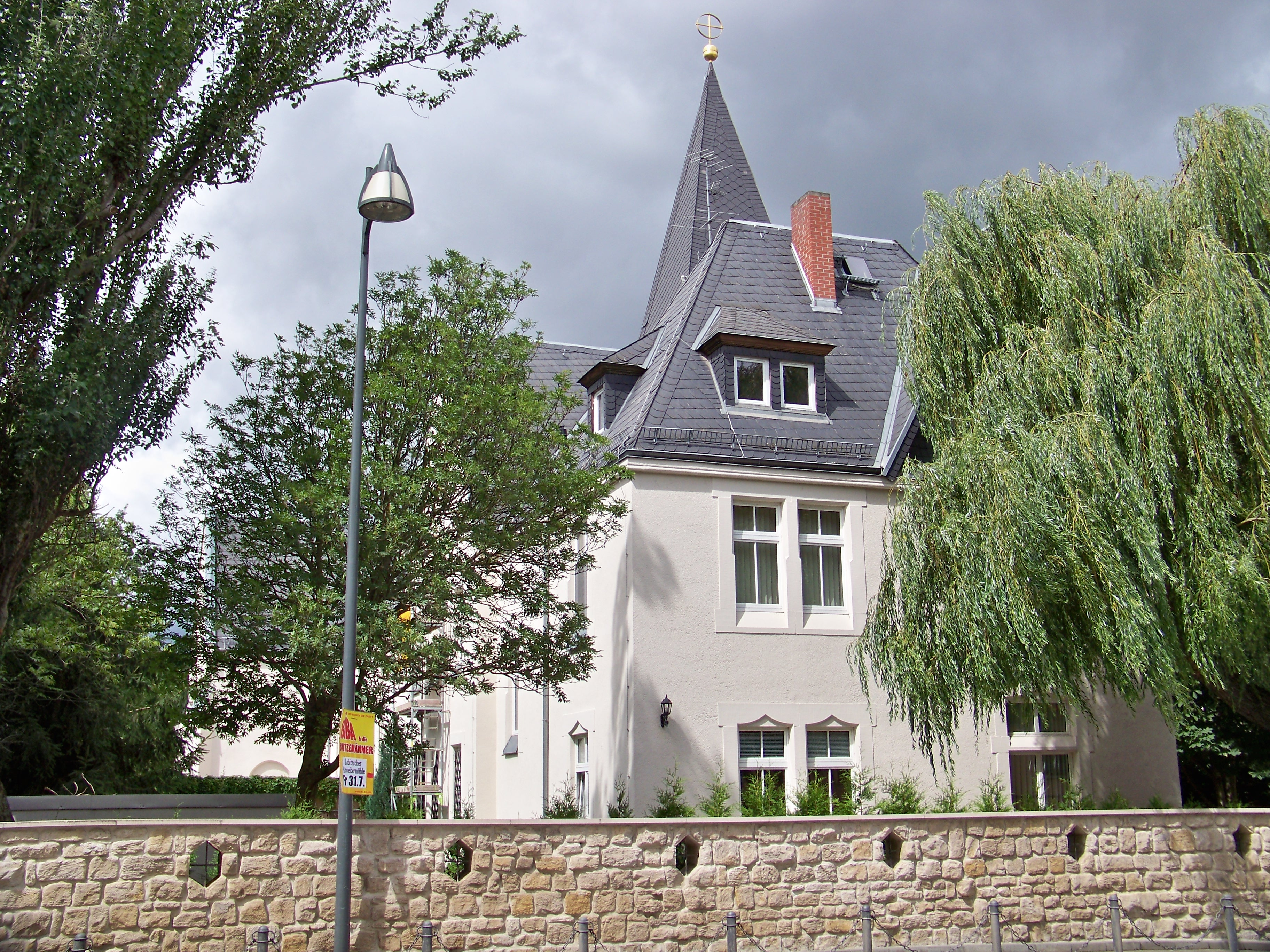 Katholische Kirche in Weißenfels, Friedrichsstraße 15